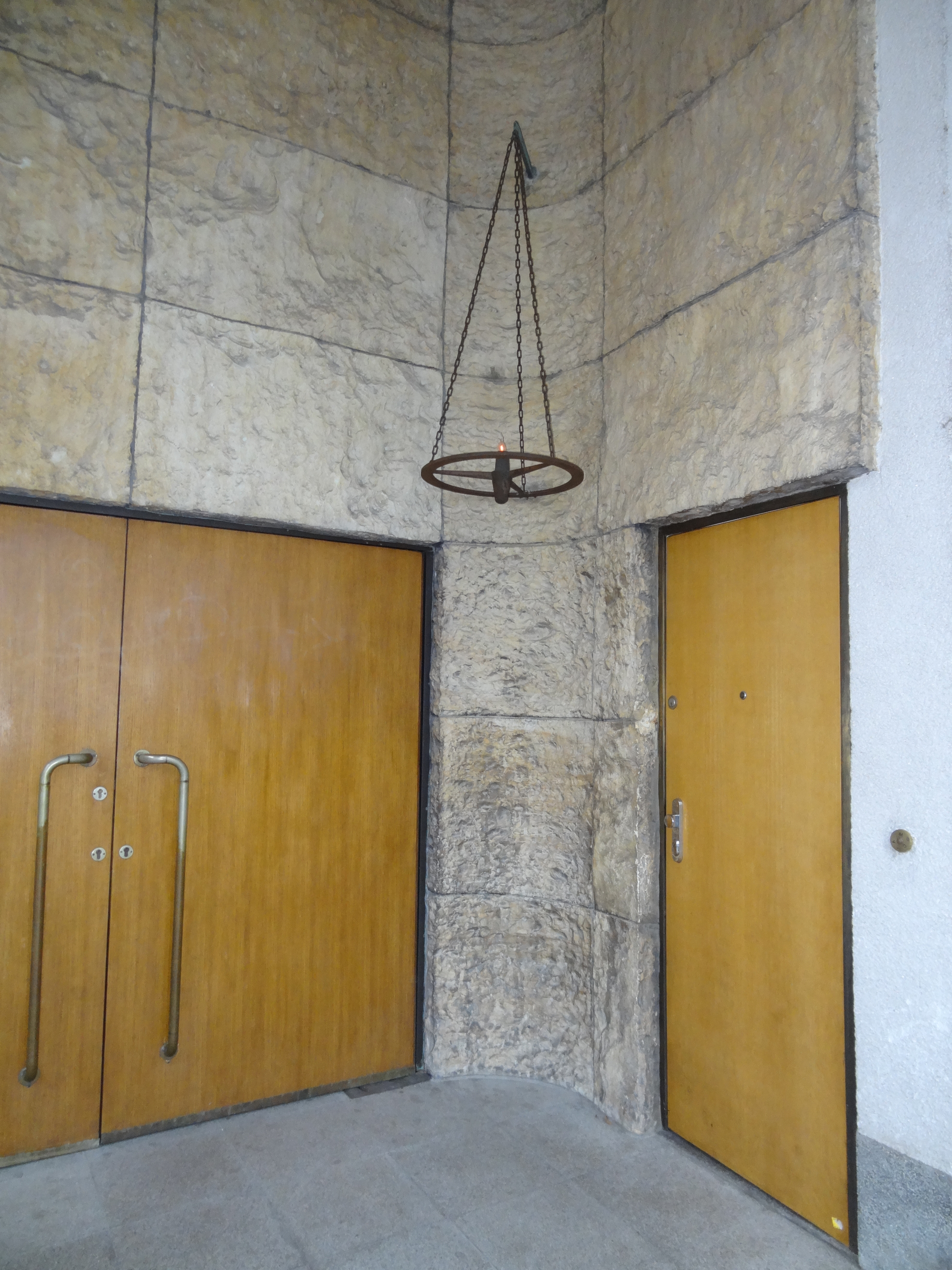 vinohrady Památkový katalog MonumNet MIS hledat obrázky hledat seznamy